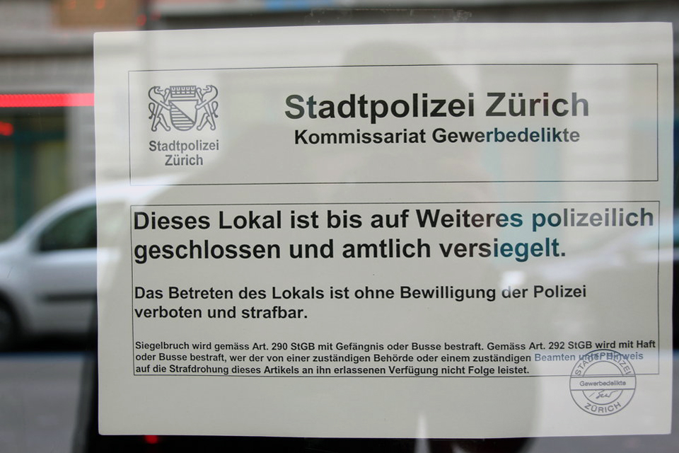 Siegel Stadtpolizei Zürich